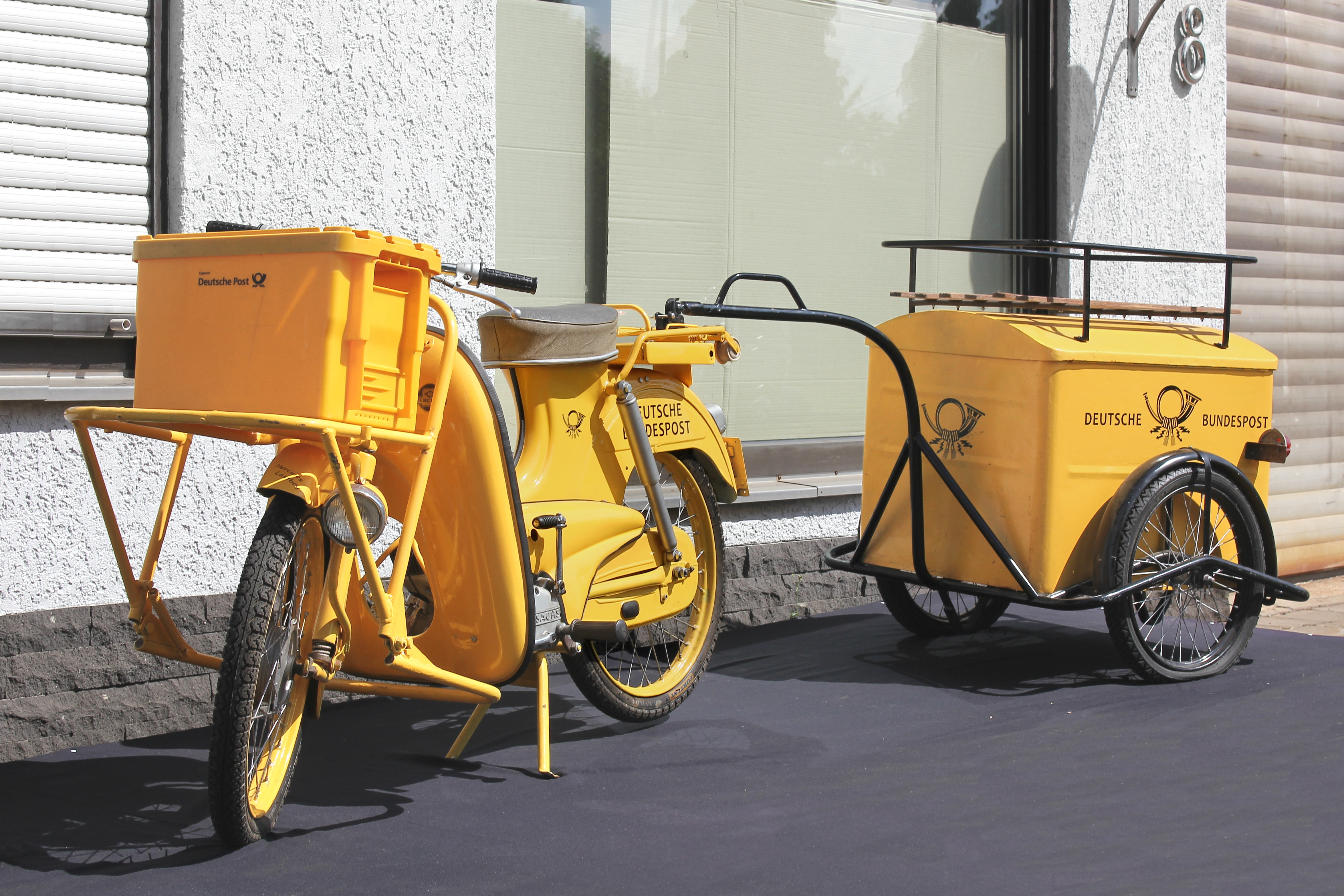 Hercules Lastboy mit Anhänger (Bauzeit 1966–1984) beim Oldtimertreffen in Kail. Sachs-Zweitaktmotor, 47 cm³, 2,6 PS, 3-Gang-Fußschaltung (anfangs mit 2-Gang-Handschaltung), vorn geschobene Kurzschwinge mit Schraubenfedern, Hinterradschwinge mit Teleskopfedern, Vollnaben-Trommelbremsen, Leergewicht 80 kg, zu. Gesamtgewicht 180 kg; ca. 1200 Stück wurden gebaut